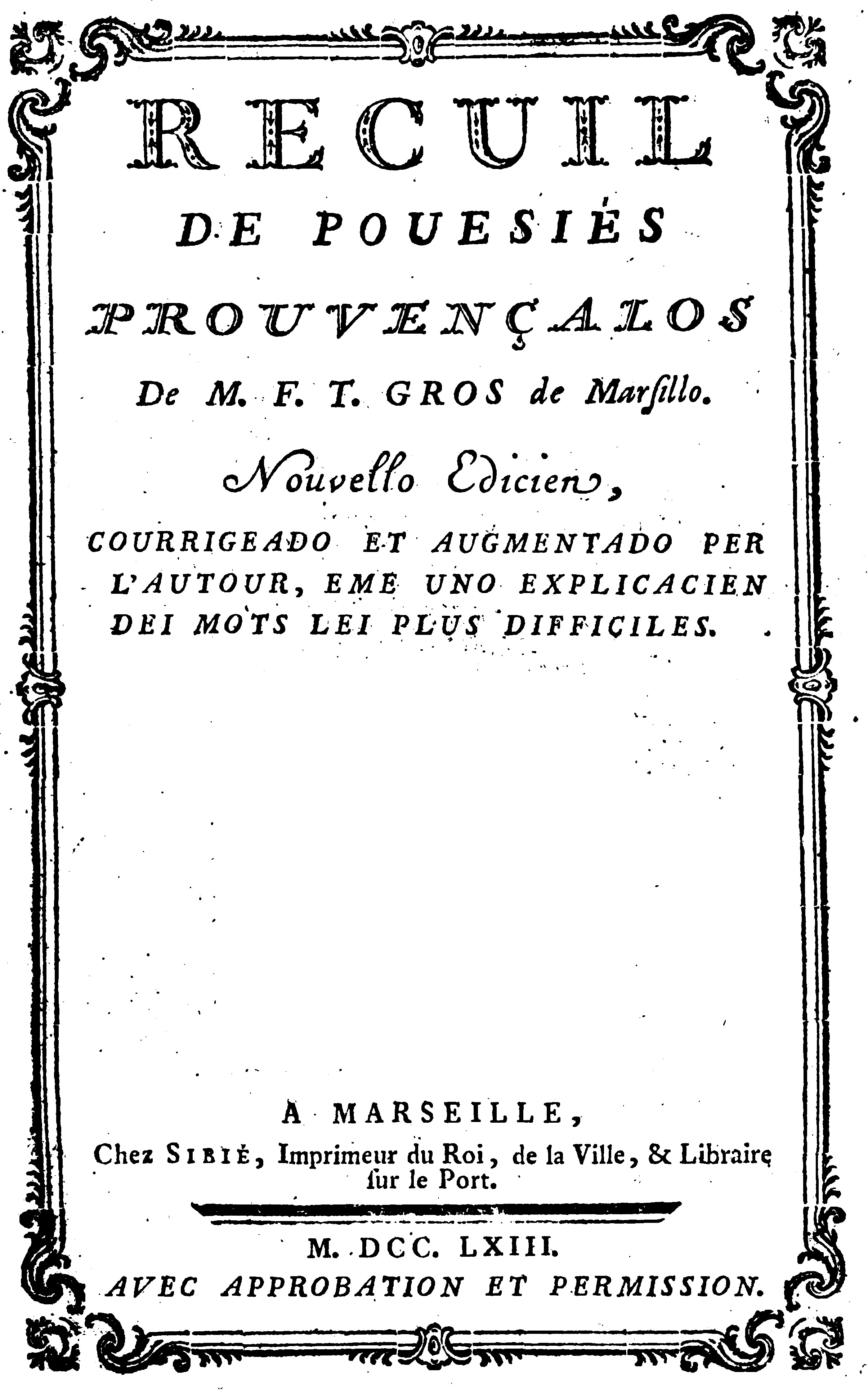 pagina du recueil de Totsant Gros